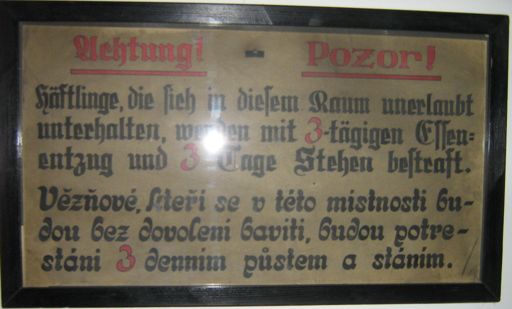 Cedule z "biografu" v Pečkově paláci v Praze. Sign situated in "biograf" in Petschka's palace in Prague.